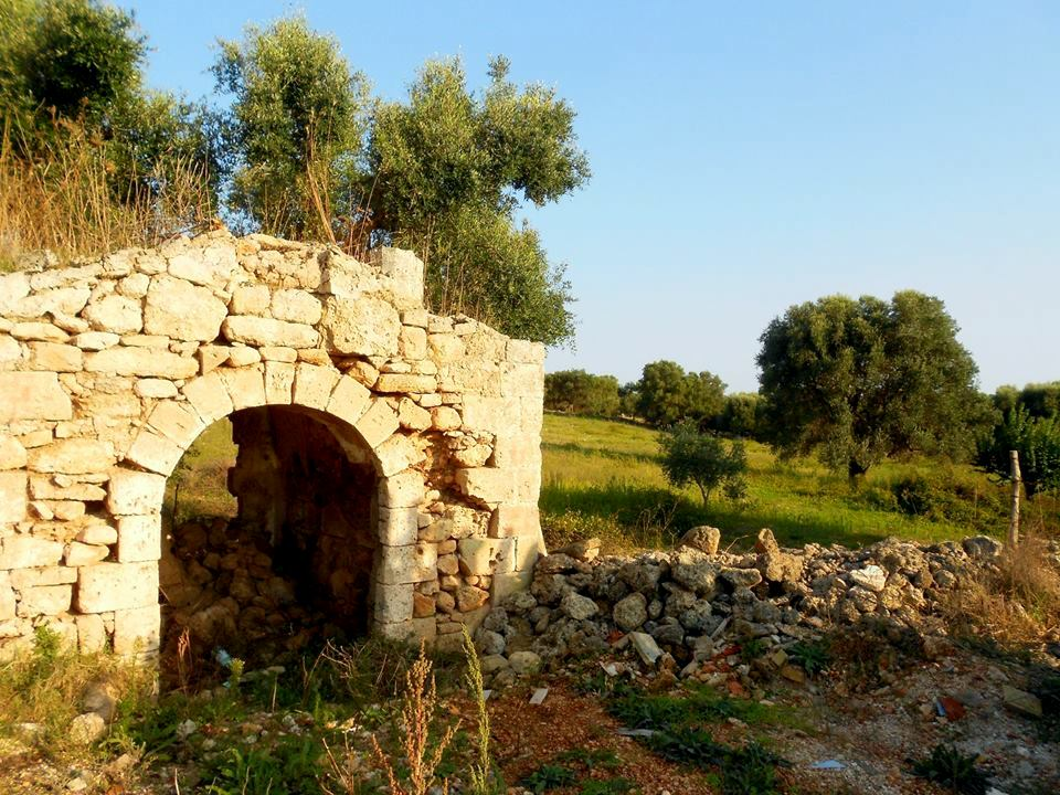 La Cappella della Madonna del Carmine (o di San Pietro), Maruggio